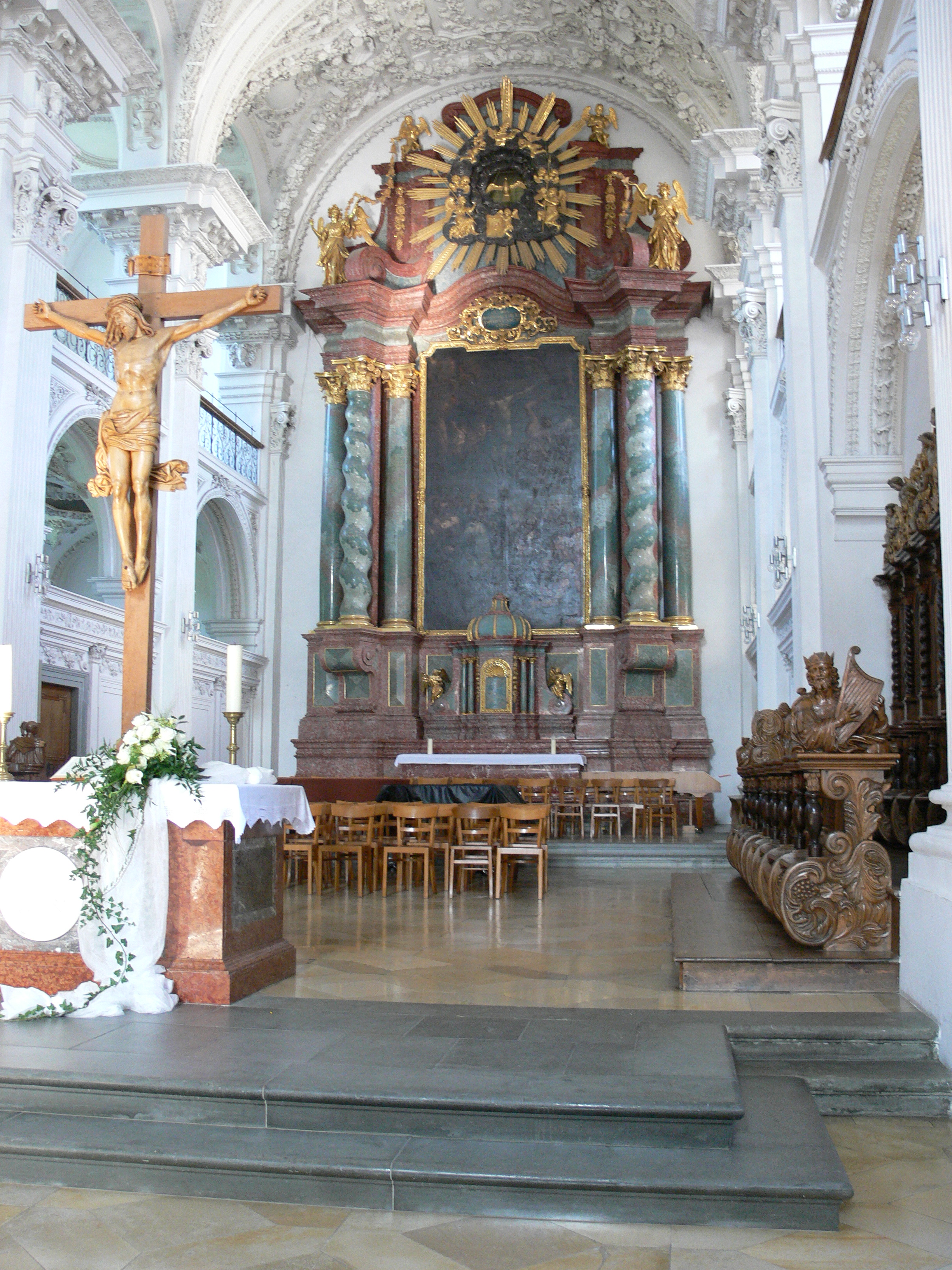 Schlosskirche Friedrichshafen (ehem. Klosterkirche Hofen) Chorraum mit Blick zum Hochaltar von Franz Schmuzer, 1712